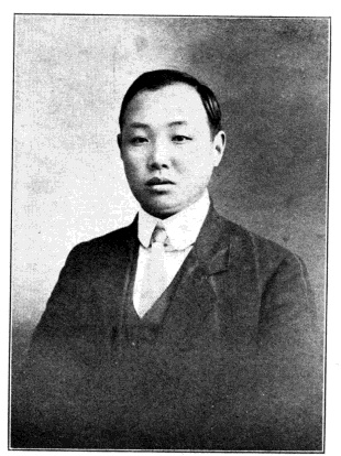 中文（台灣）: 中華民國國會議員